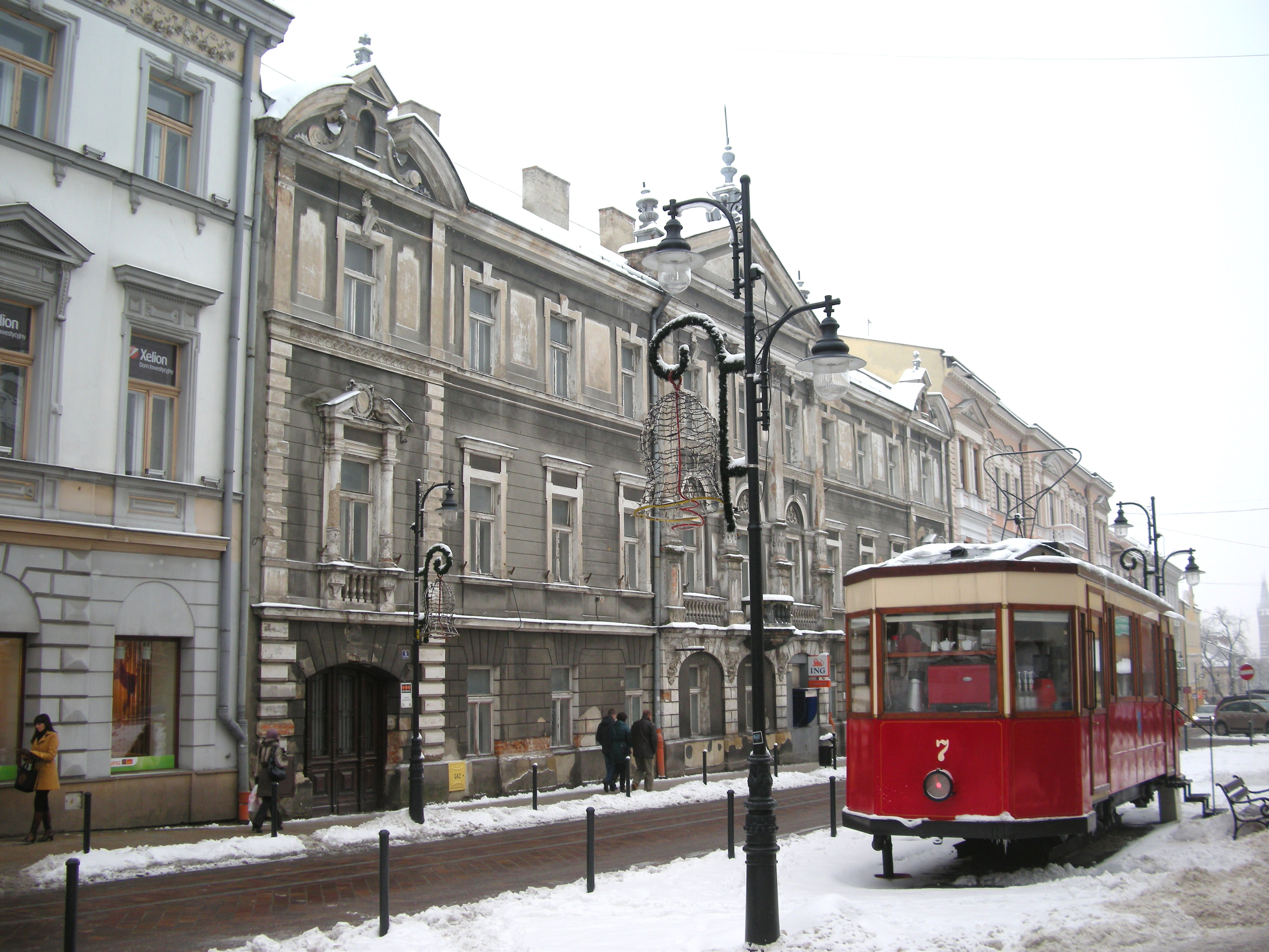 Replika tramwaju przed budynkiem dawnego starostwa.